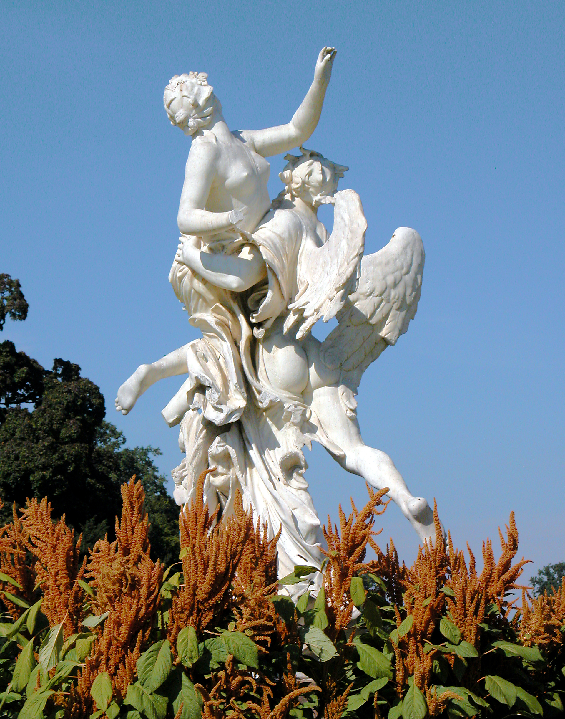 12.09.2010 Dresden: Großer Garten. Marmorplastik "Die Zeit entführt die Schönheit" (Pietro Balestra, 1. Hälfte 18. Jh.), Palaisgarten (GMP: 51.038529,13.761161). [DSCNn1776.TIF]20100912025DR.JPGc)Blobelt